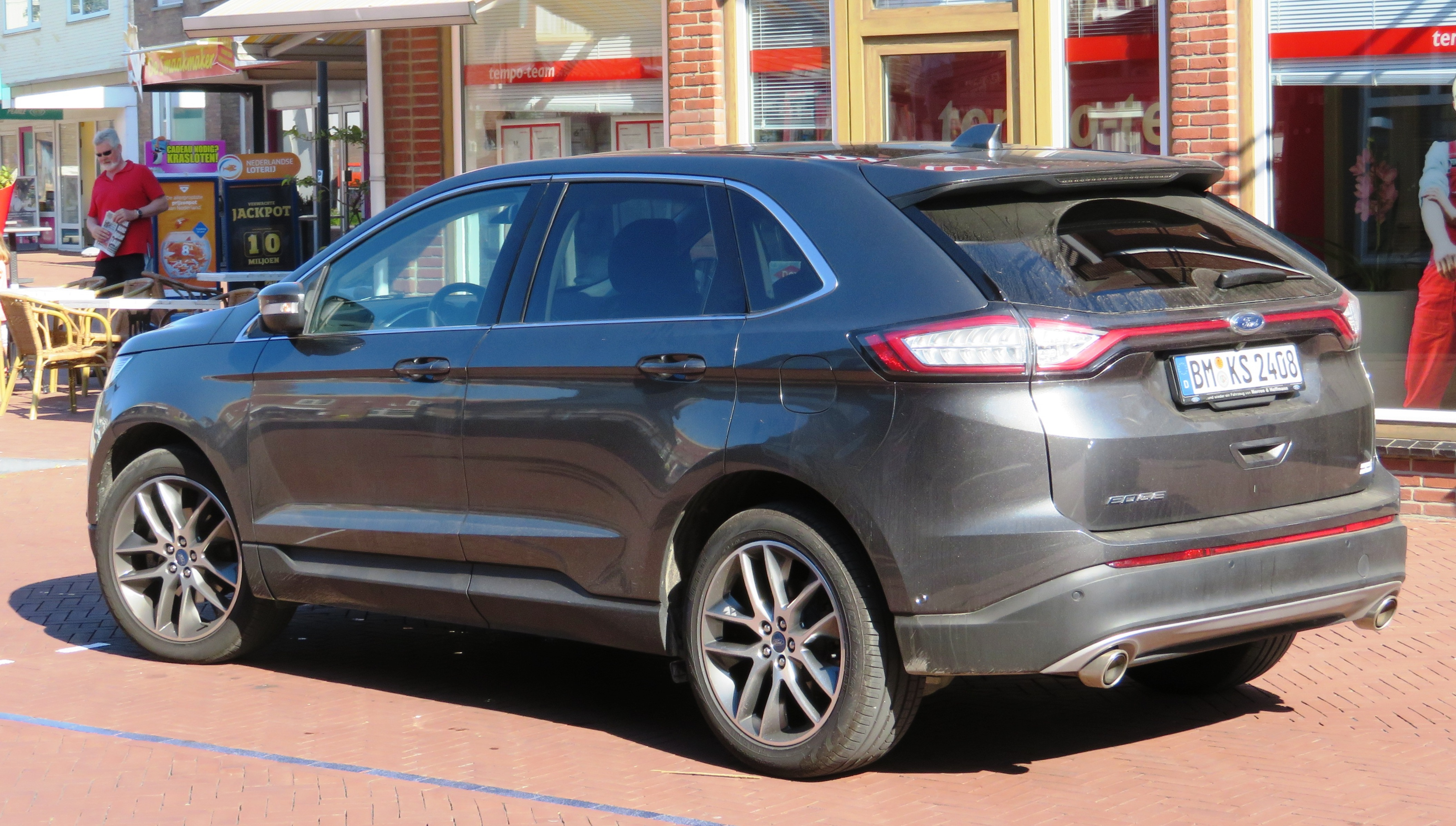 Ford Edge (2017)